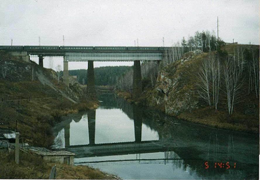 Железнодорожный мост через Каменку в черте Камменска-Уральского.По этому мосту проходит большинство поездов,следующих из Москвы и Петербурга в Омск,Барнаул,Алма-Ату,Бишкек.